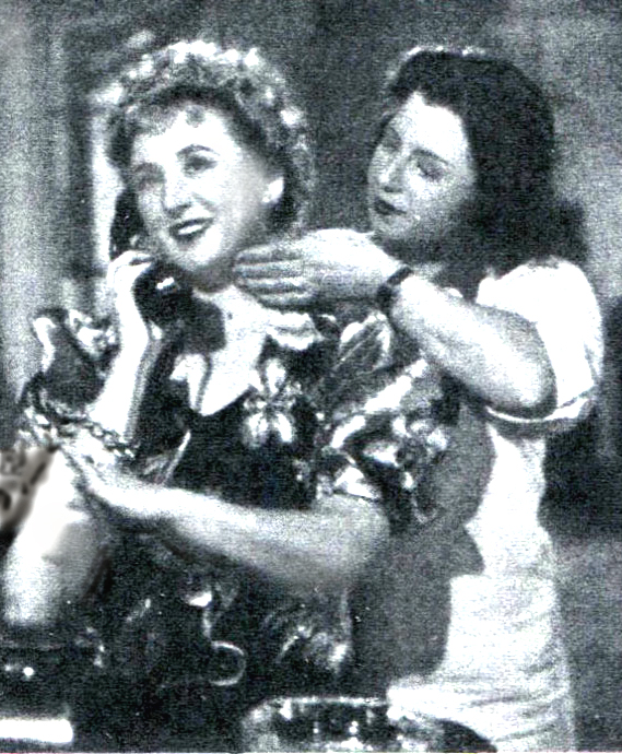 Jone Morino in "C'è sempre un ma! " (Zampa, 1943)